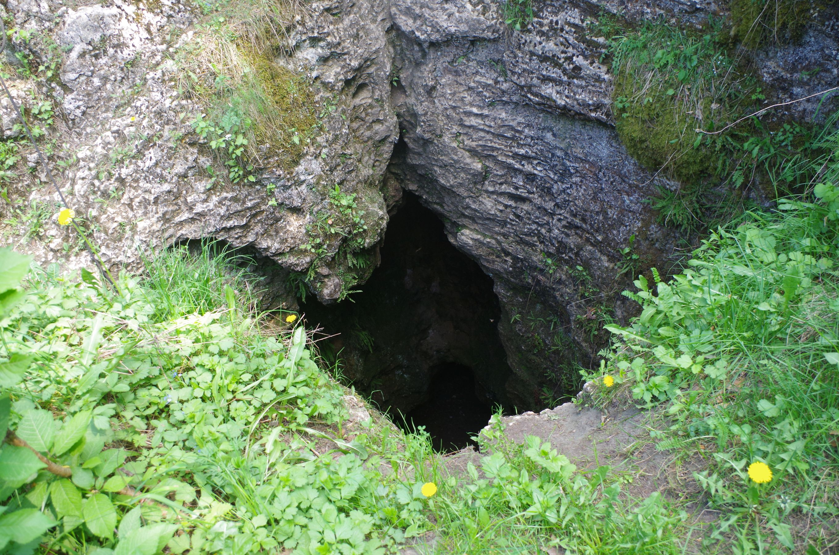 Wlot do Jaskini Żabiej w Podlesicach